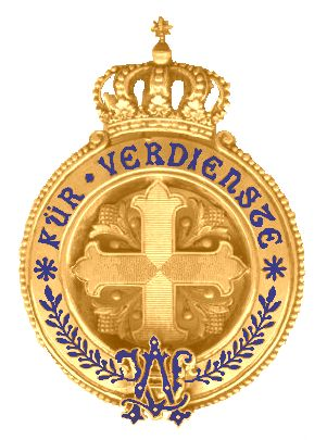 Frauenverdienstkreuz